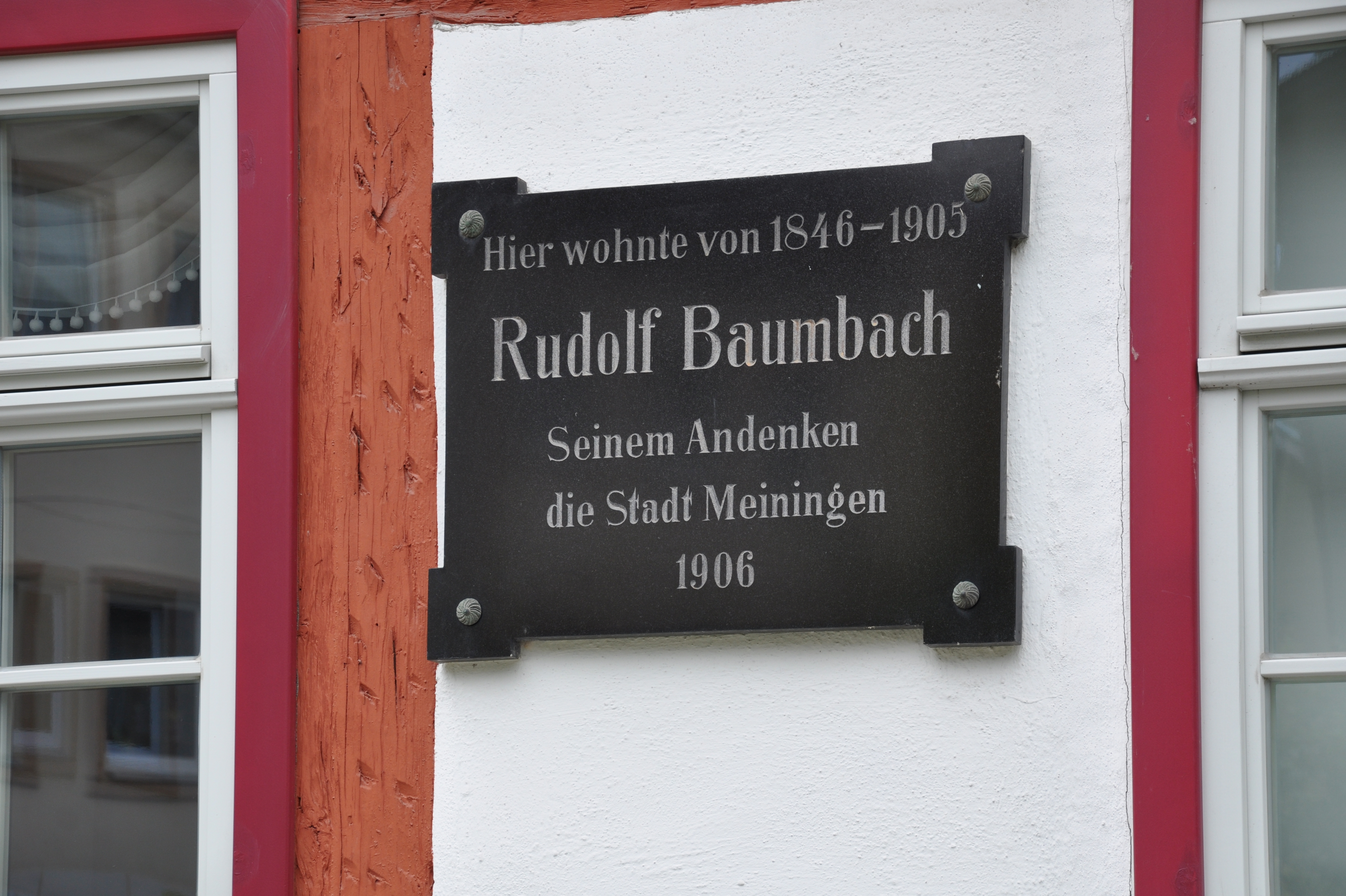 Meiningen, Haus Burggasse 22 (Baumbachhaus)